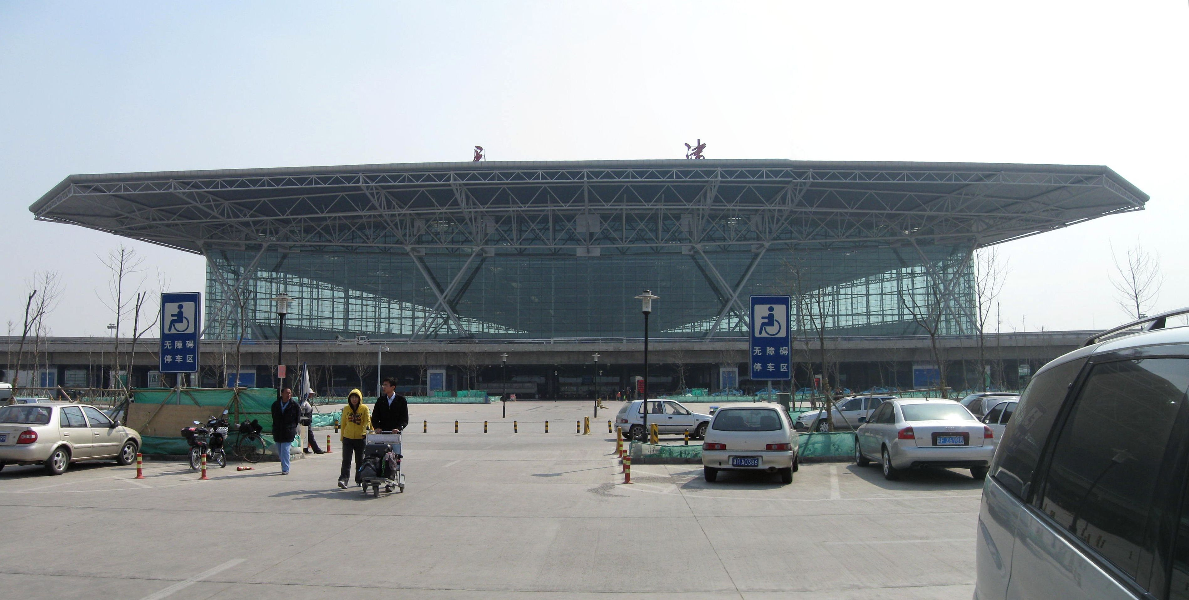 Tianjin Binhai International Airport (Sân bay quốc tế Tân Hải Thiên Tân)